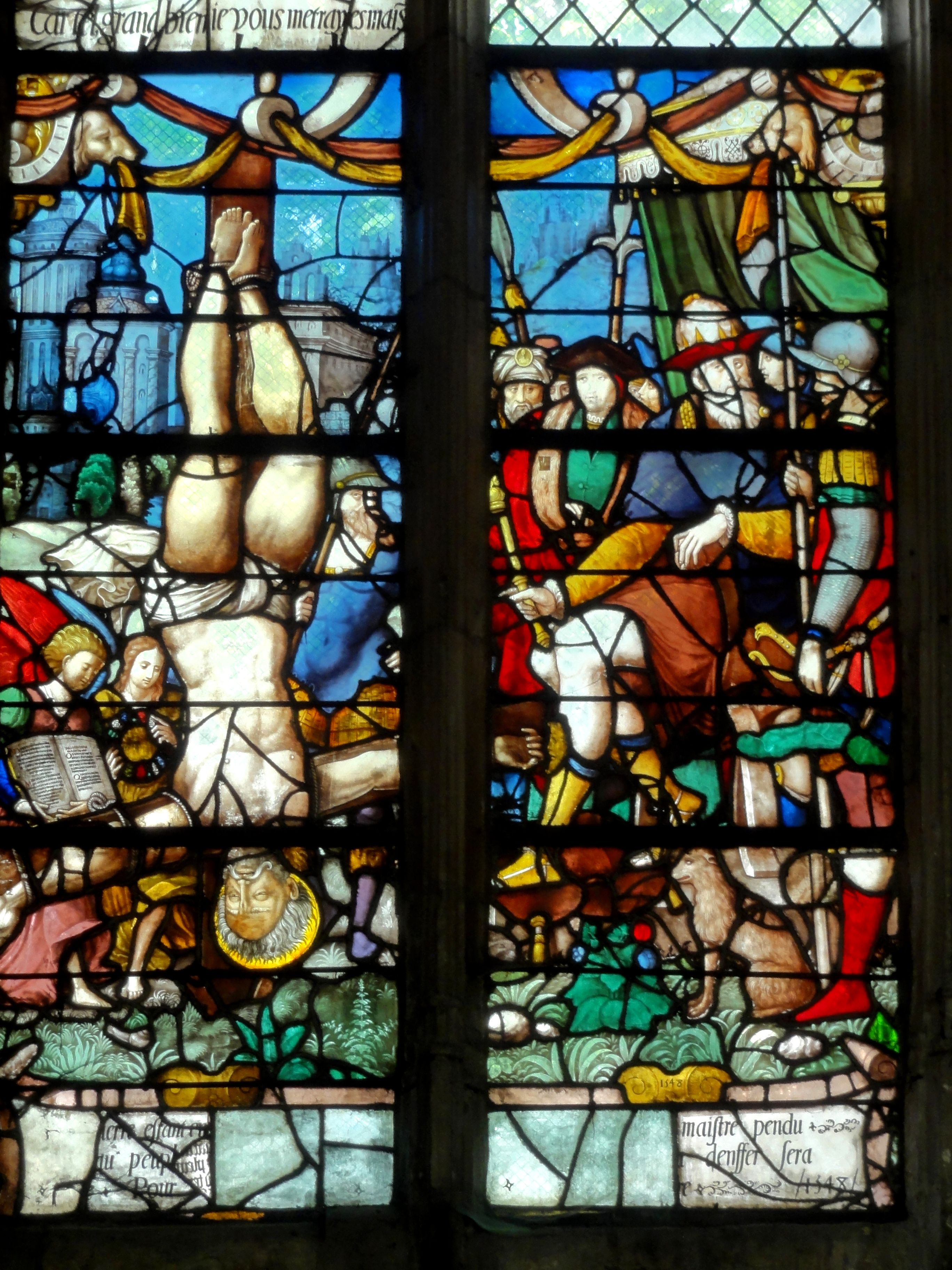 Vitrail de la baie n° 16 dans la chapelle Saint-Pierre, dans le déambulatoire sud : Conversion de St Paul & Vie de St Pierre.